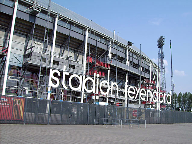 Voorzijde Stadion Feijenoord. Foto is eigen werk, gemaakt: mei 2006